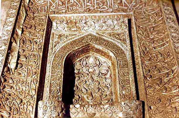 marand mehrab